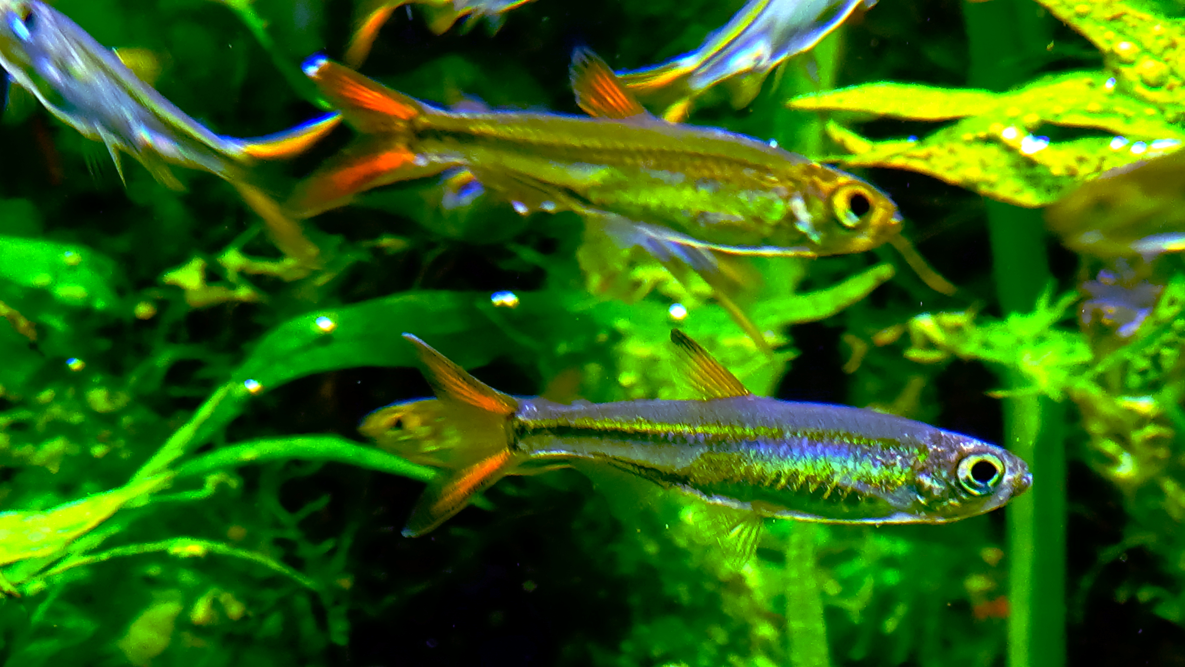 Ladigesia roloffi - Aquarium tropical du Palais de la Porte Dorée - 06/2015